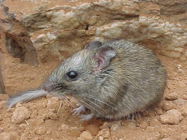 Central Rock-rat (Zyzomys pedunculatus)